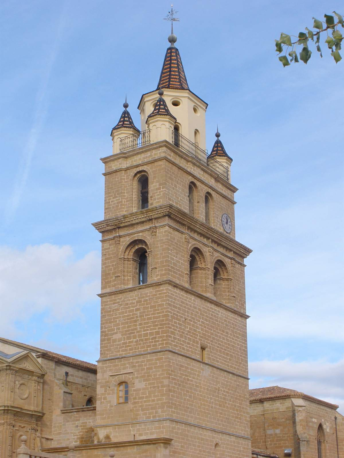 Catedral de Calahorra (La Rioja)